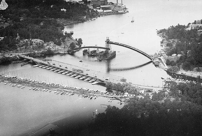 Tranebergsbron under byggnad Närmast i bild syns den äldsta Tranebergsbron, en flottbro. I mitten syns den gamla pontonbron.